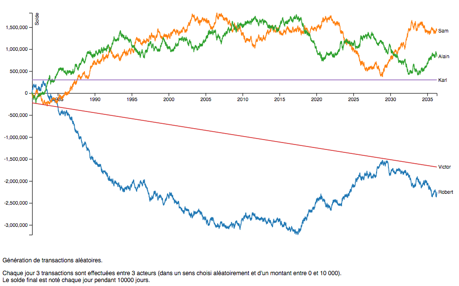 Grosse asymétrie dans la simulation d'un échange entre 3 acteurs dans le cadre d'un crédit mutuel. On voit ici la création d'une poche de stagnation